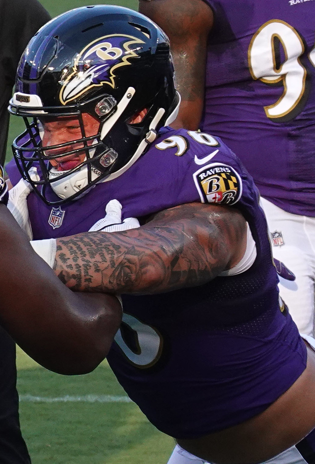 Rams at Ravens 8/9/18